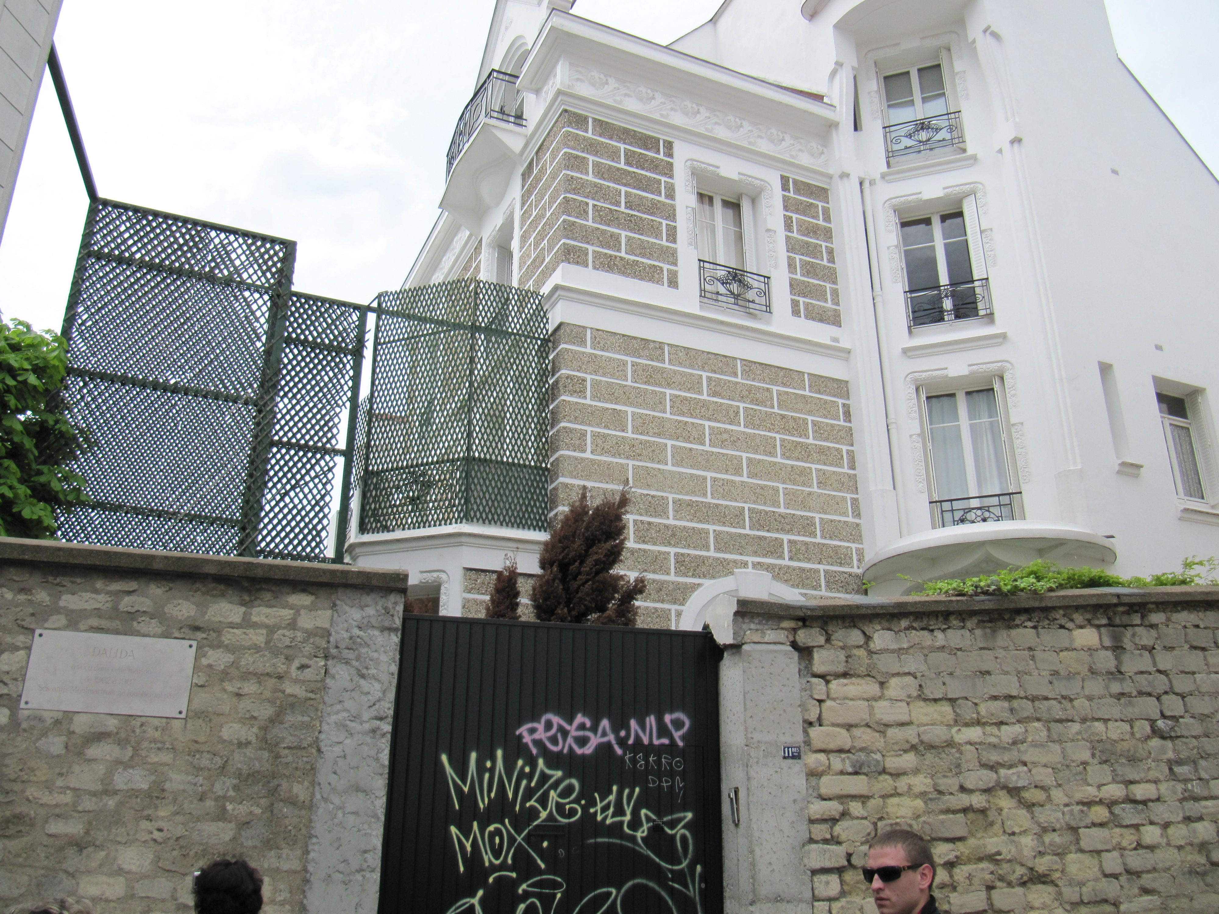 Montmartre, Paris